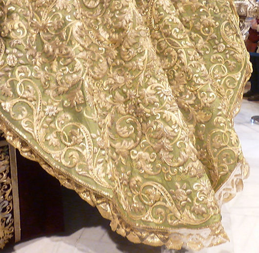 Palio £Virg Macarena